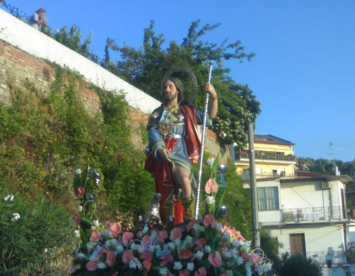 Processione di San Rocco, del 16 agosto, in via del Concordato a Palmi (RC)